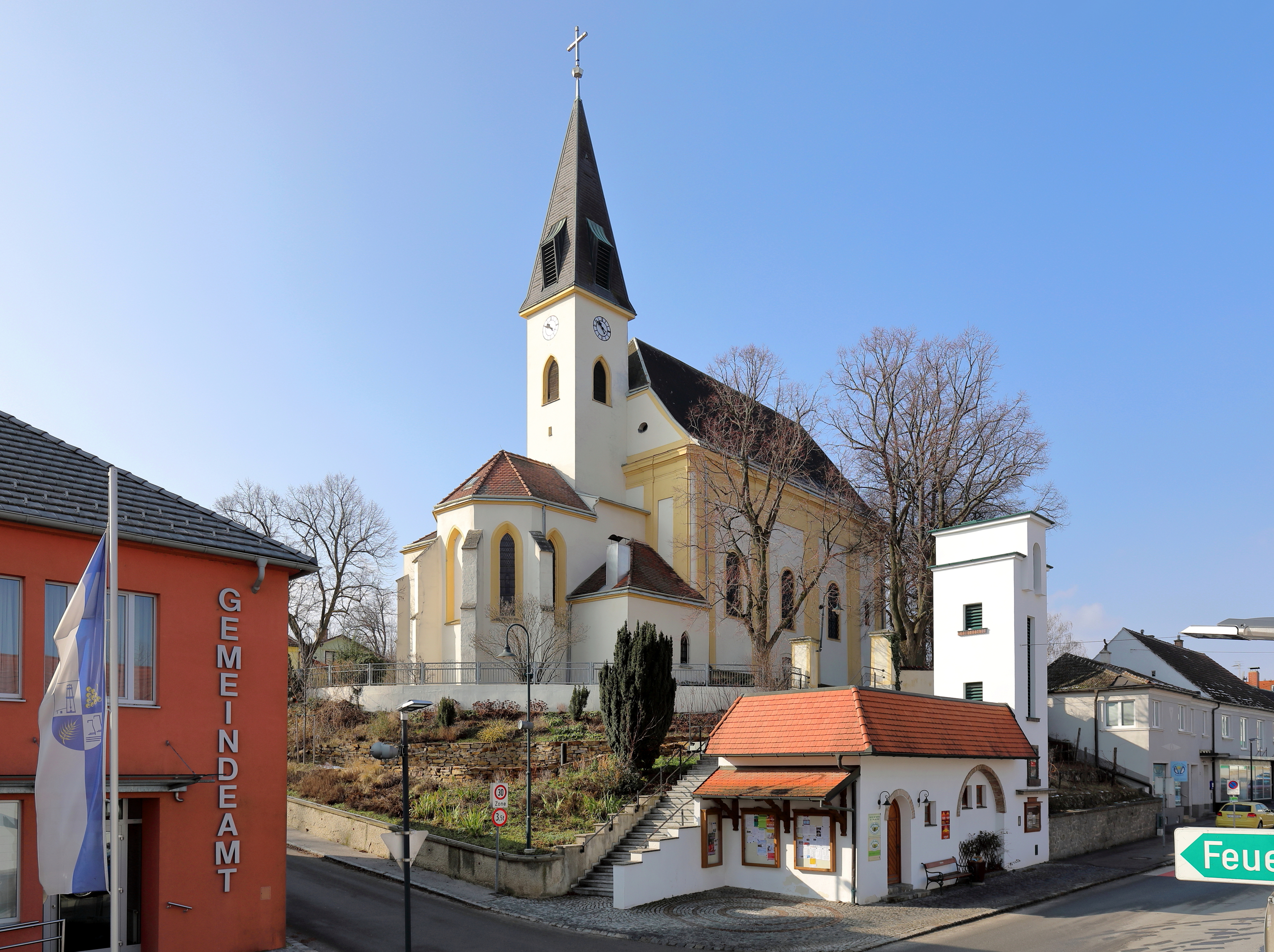 Das Ortszentrum der niederösterreichischen Marktgemeinde Auersthal.Im Zentrum des Bildes die in erhöhter Lage errichtete röm.-kath. Pfarrkirche hl. Nikolaus. Ganz links das Gemeindeamt und unterhalb der Kirche das ehemalige Zeughaus der Feuerwehr. Dieses wurde 1965 anstelle eines Vorgängerbaues errichtet und wird (2018) nach Adaptierung als Weinladen genutzt.